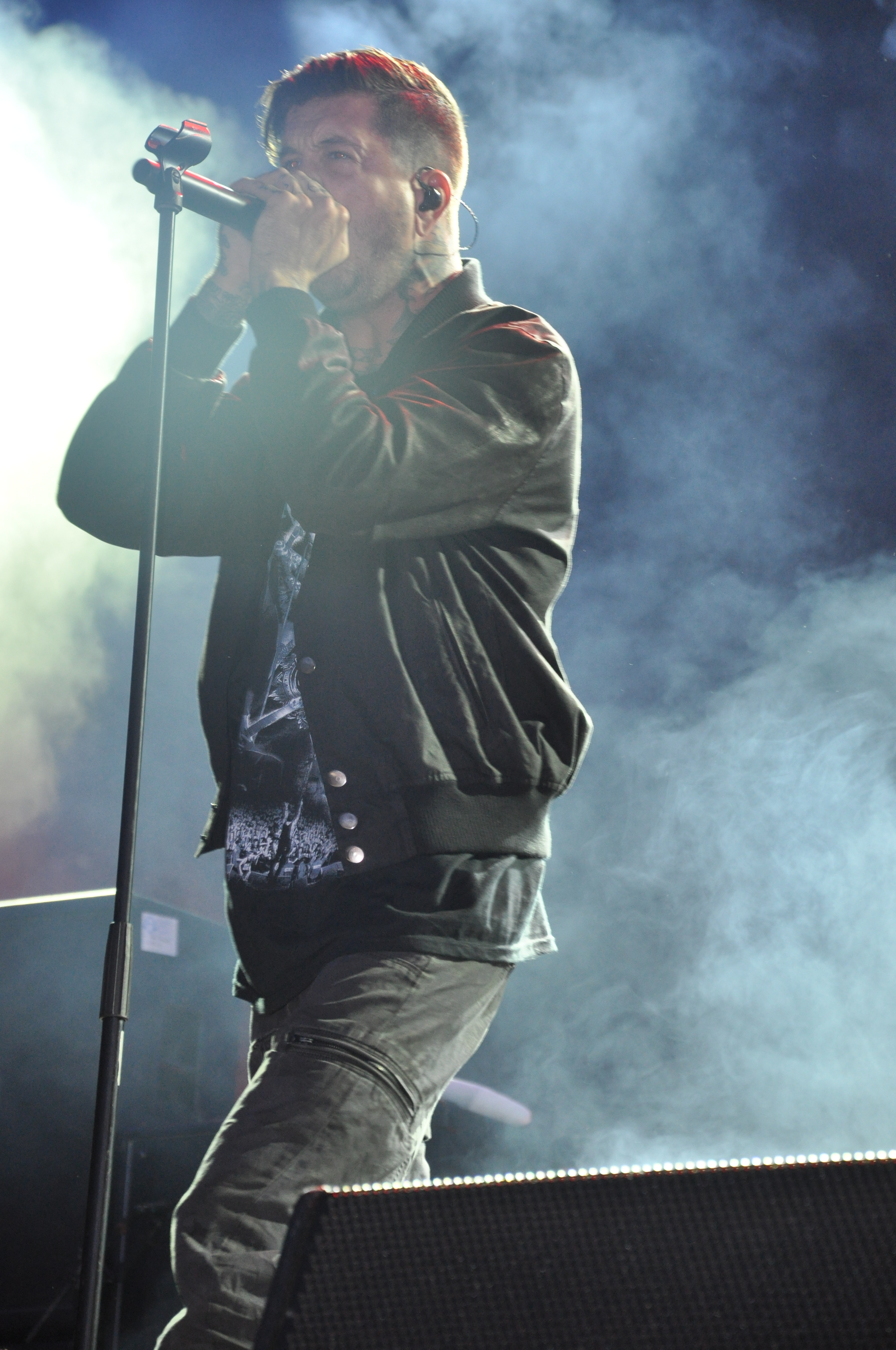 Of Mice & Men auf der Clubstage bei Rock am Ring 2014